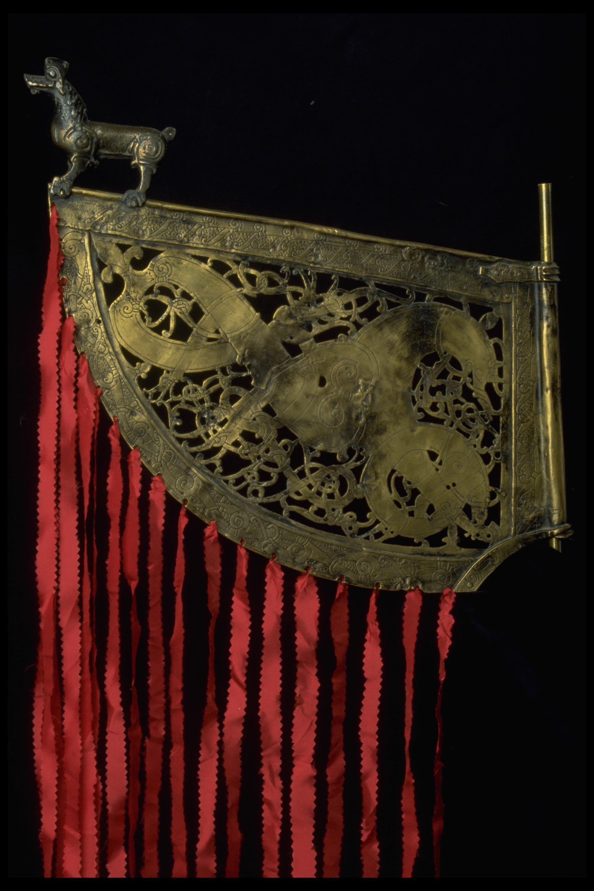 Söderalaflöjeln av brons från vikingatid, Gävleborg, Sverige.